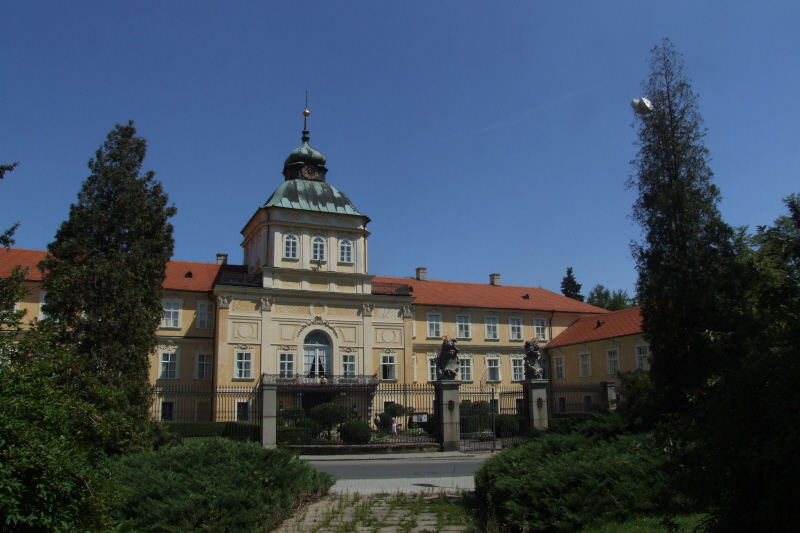 Schloss Horovice in Tschechien